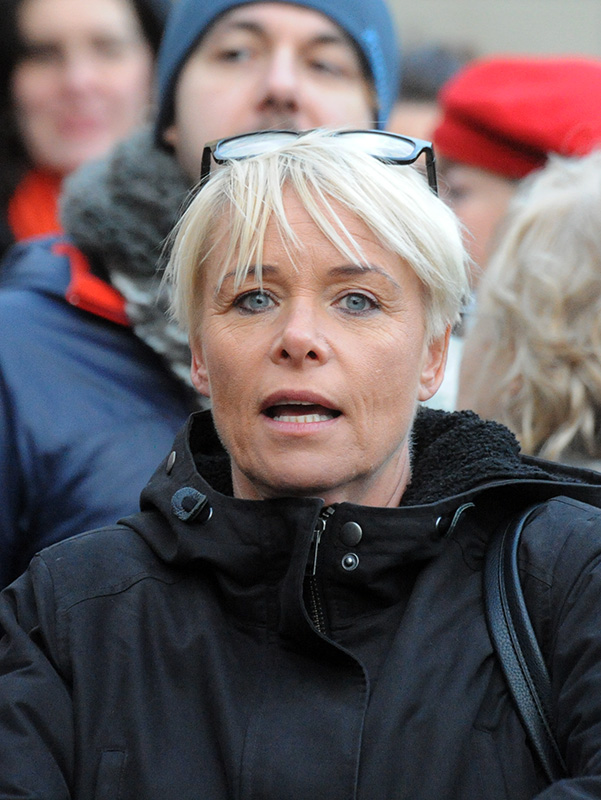 Mia Törnblom